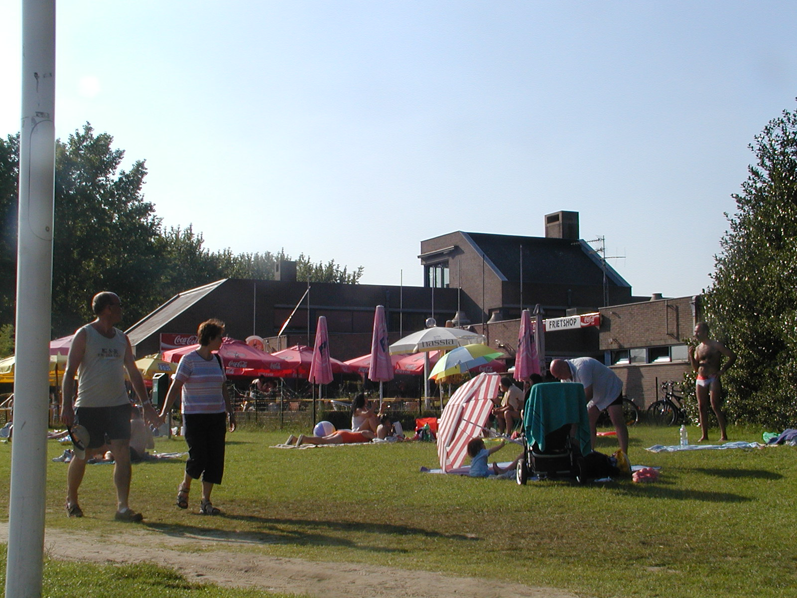 Trinkejo De Piereput en Blaarmeersen en Gento aŭtoro: Yves NEVELSTEEN dato: julio 2005